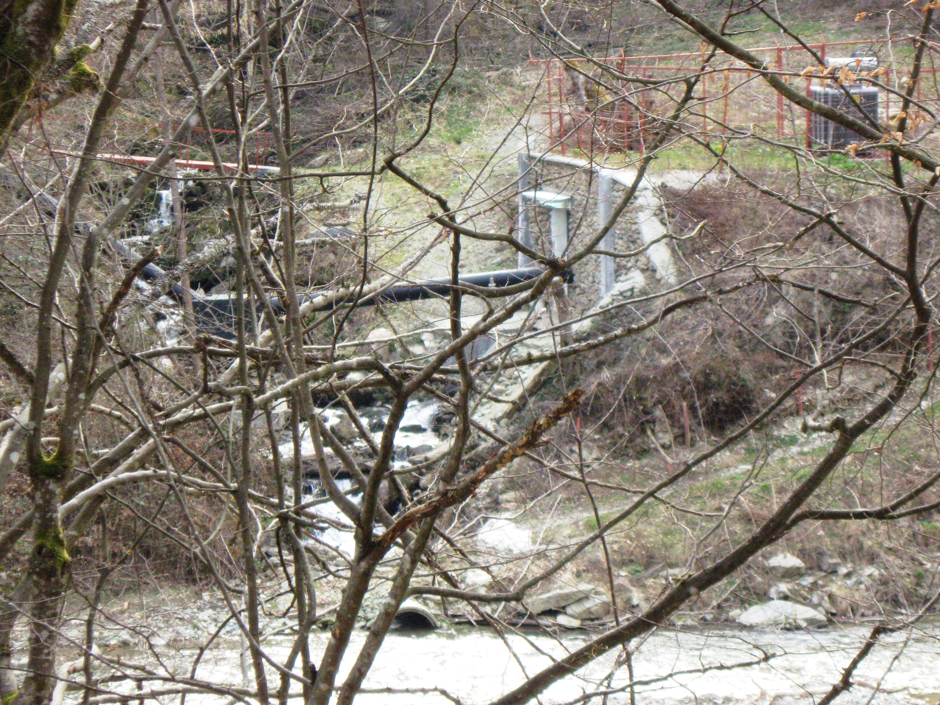 Snimak: Radosav Stojanović